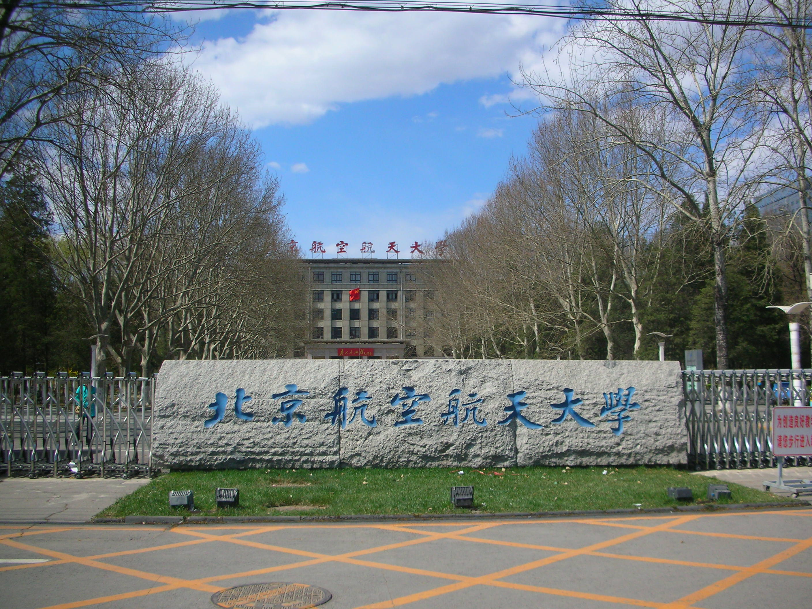 北京航空航天大学正门